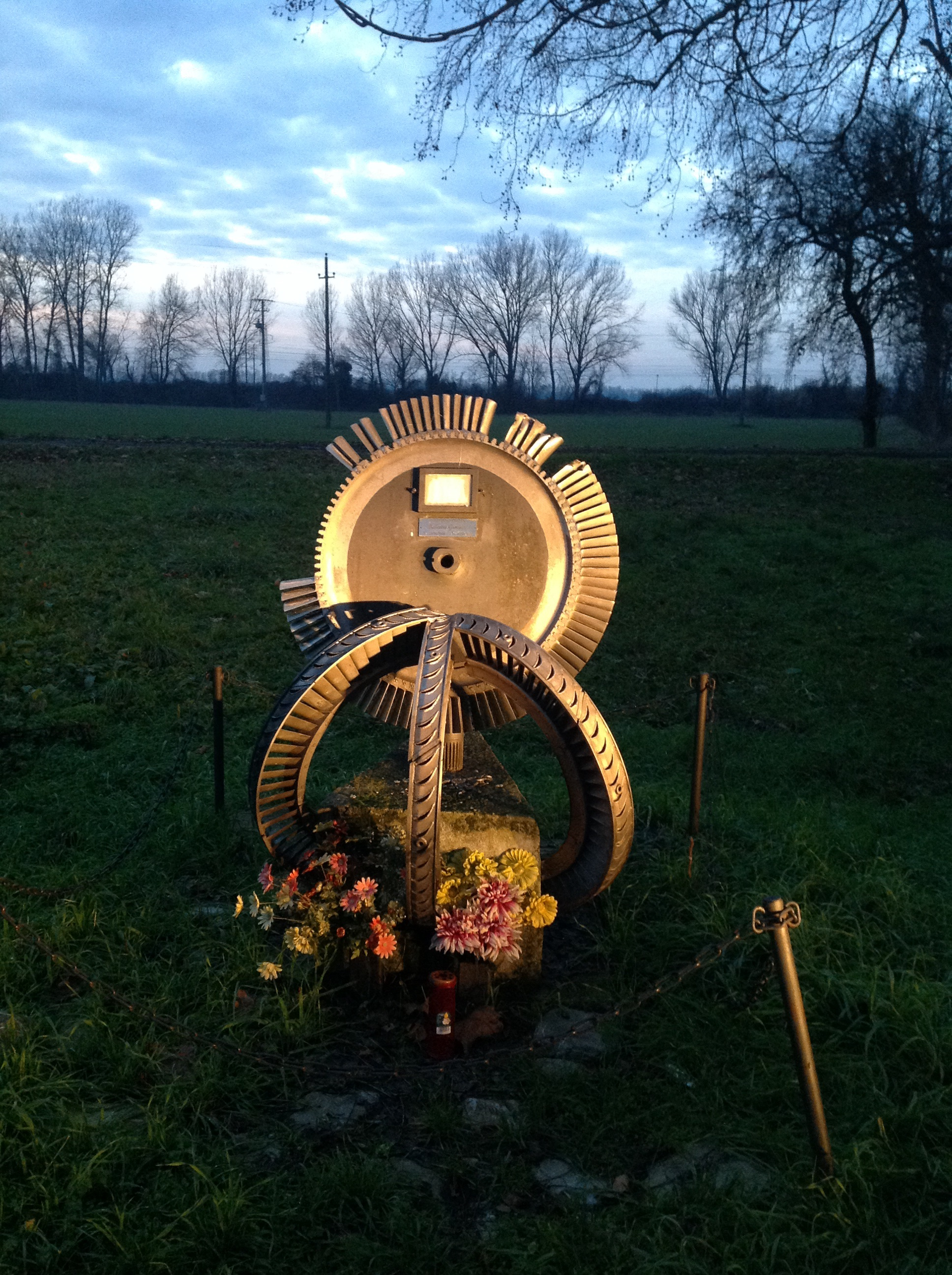 Monumento presso Castelletto di Branduzzo